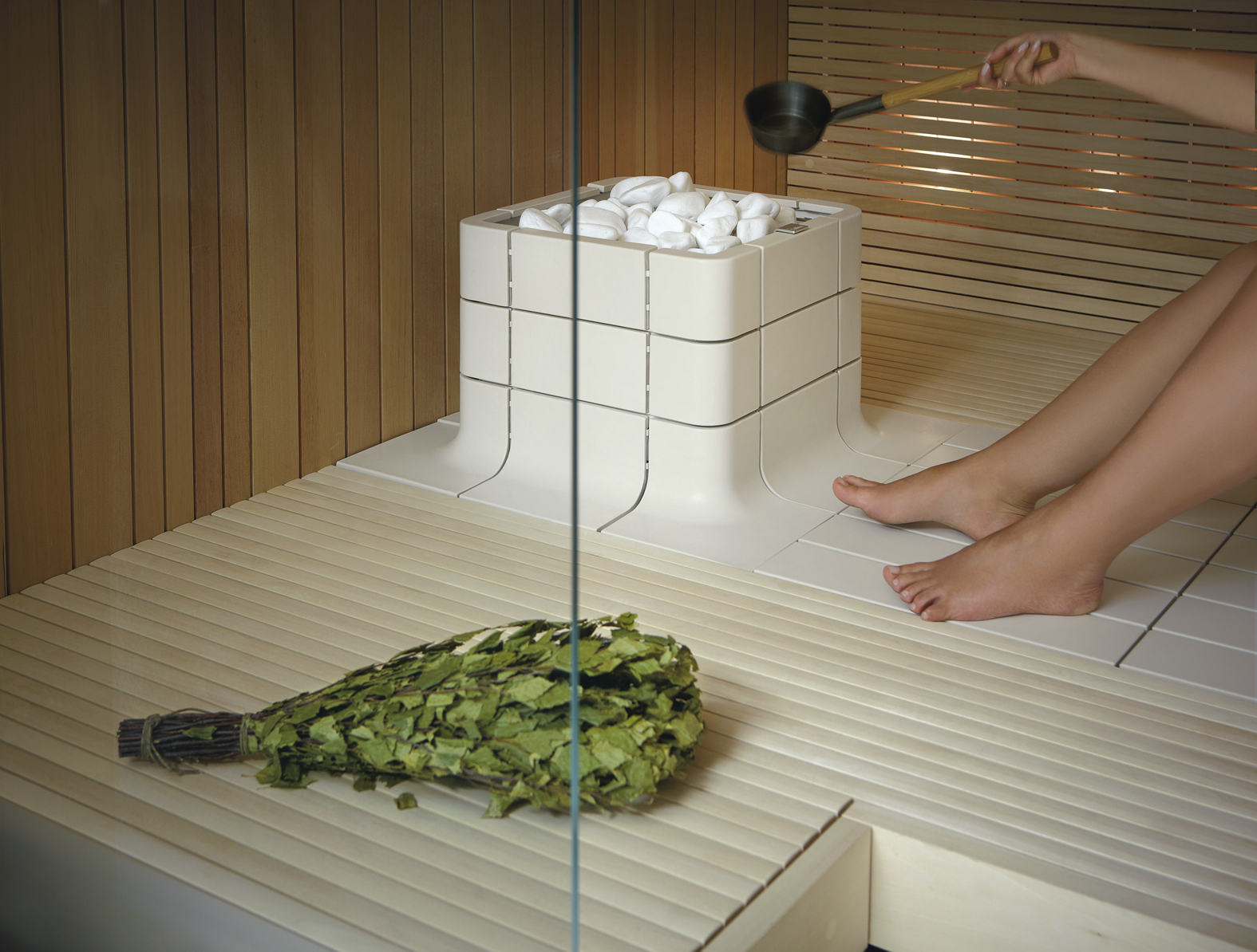 Tulikivi Nuoska-kiuas